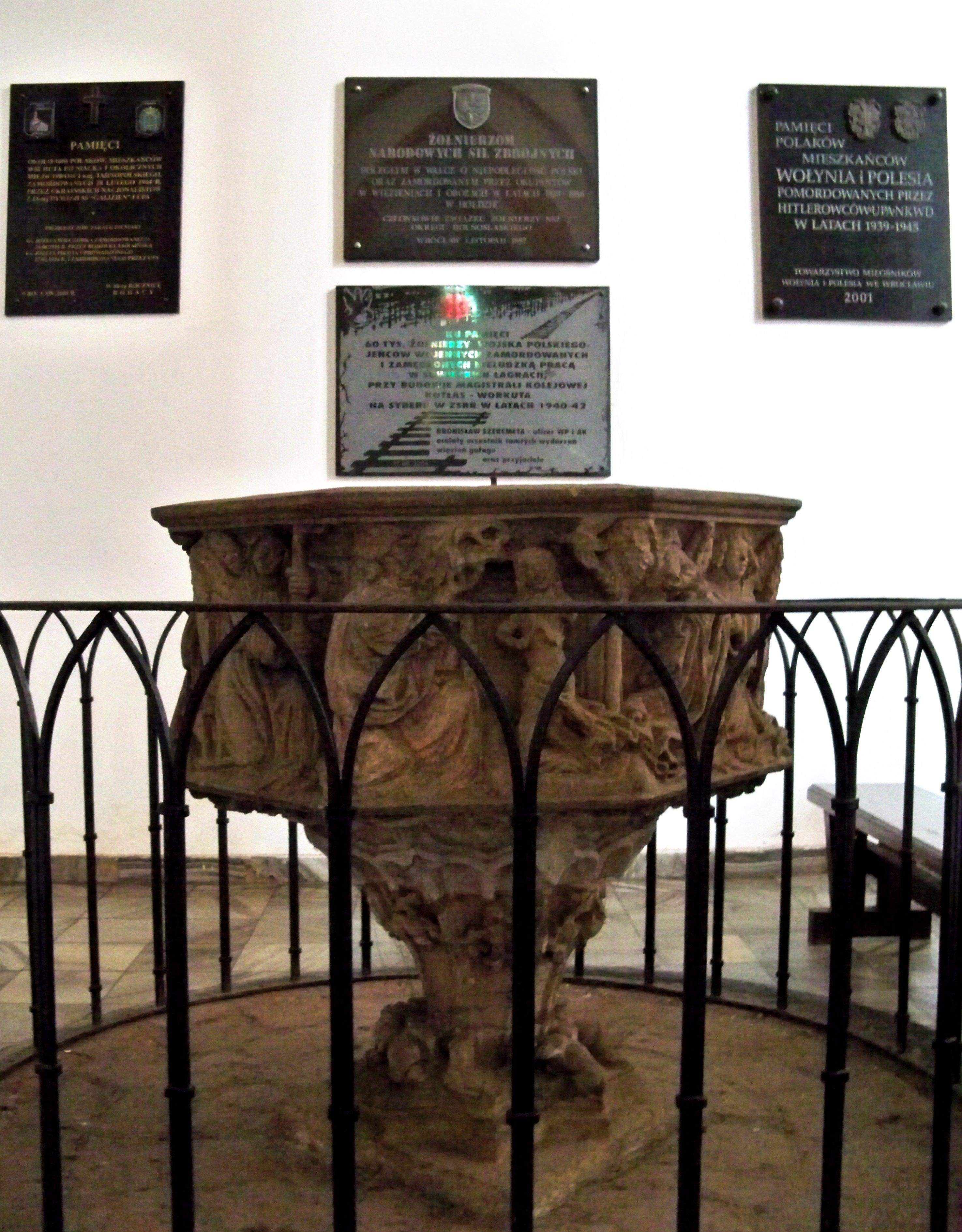 Kościół Najświętszej Marii Panny na Piasku, Wrocław